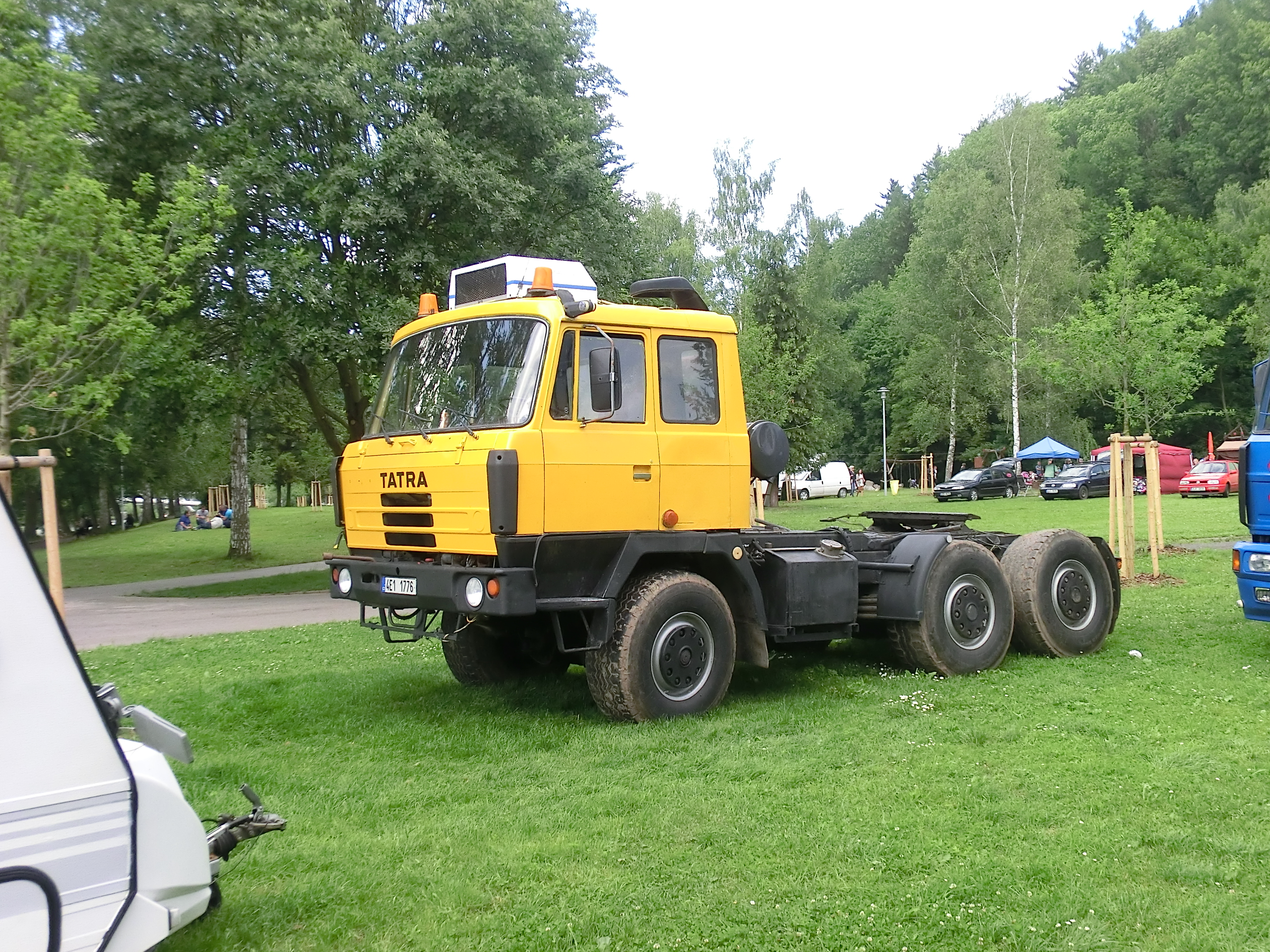 V červnu 2015 přijeli kolotočáři do Semil mimo jiné s modrým valníkem LIAZ (pravděpodobně typ 110.073) a s třínápravovým tahačem Tatra (pravděpodobně typ 815-260N12).